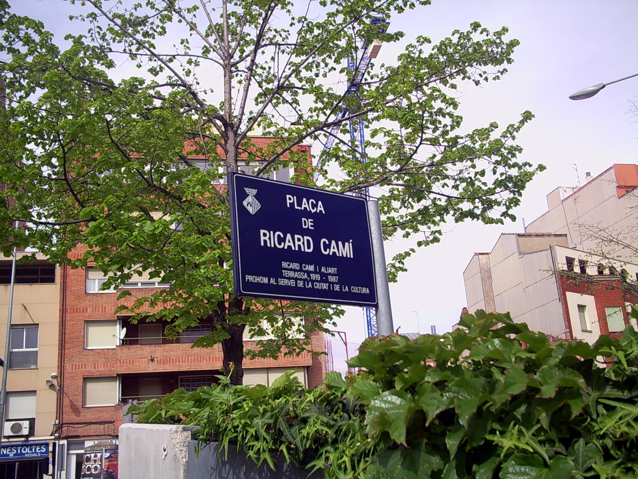 Plaça de Ricard Cami, a Terrassa, (Catalunya).